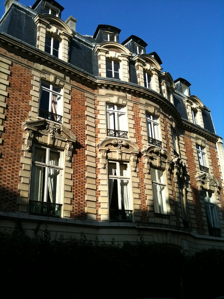 Rue de Chanaleilles 4